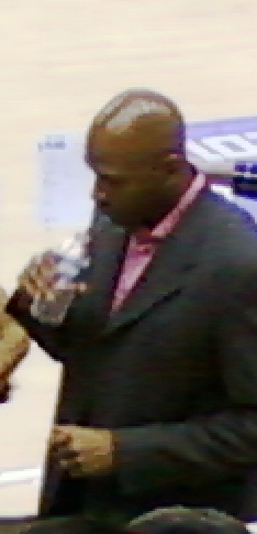 Ron Stewart (entraîneur adjoint du PL) lors du match Paris Levallois - Dijon du 03 décembre 2011